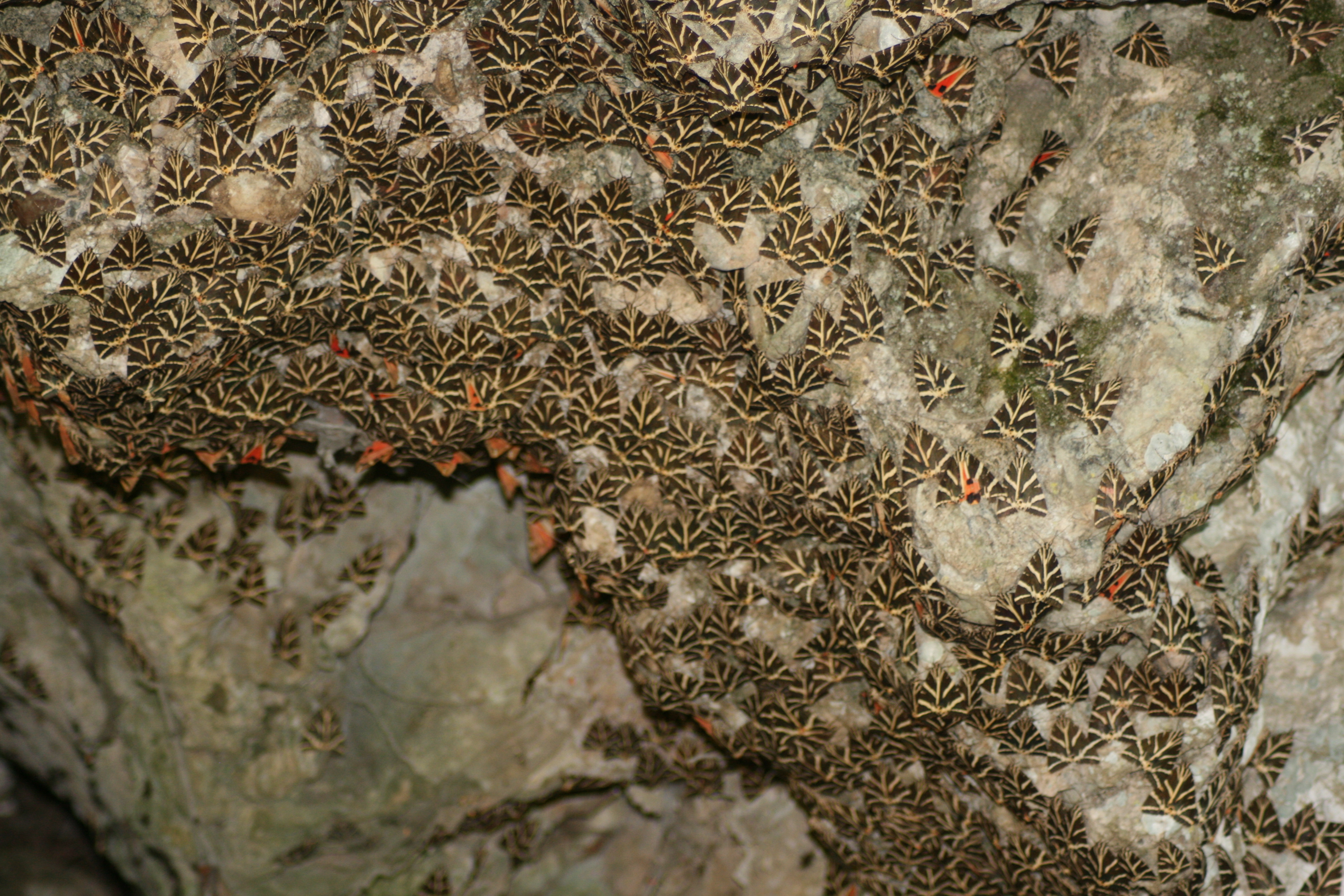 Russischer Bär